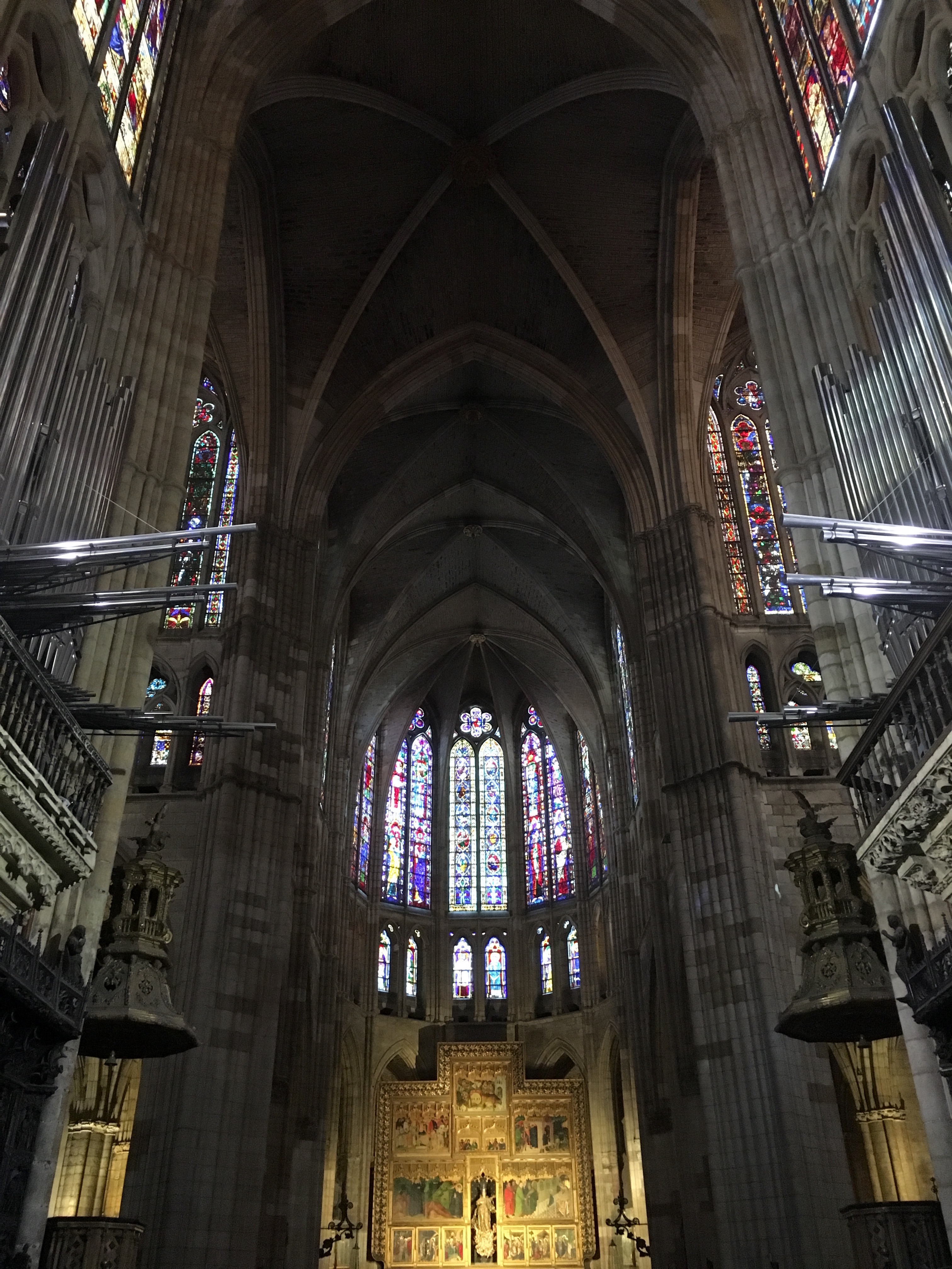 Interior de la catedral de León.